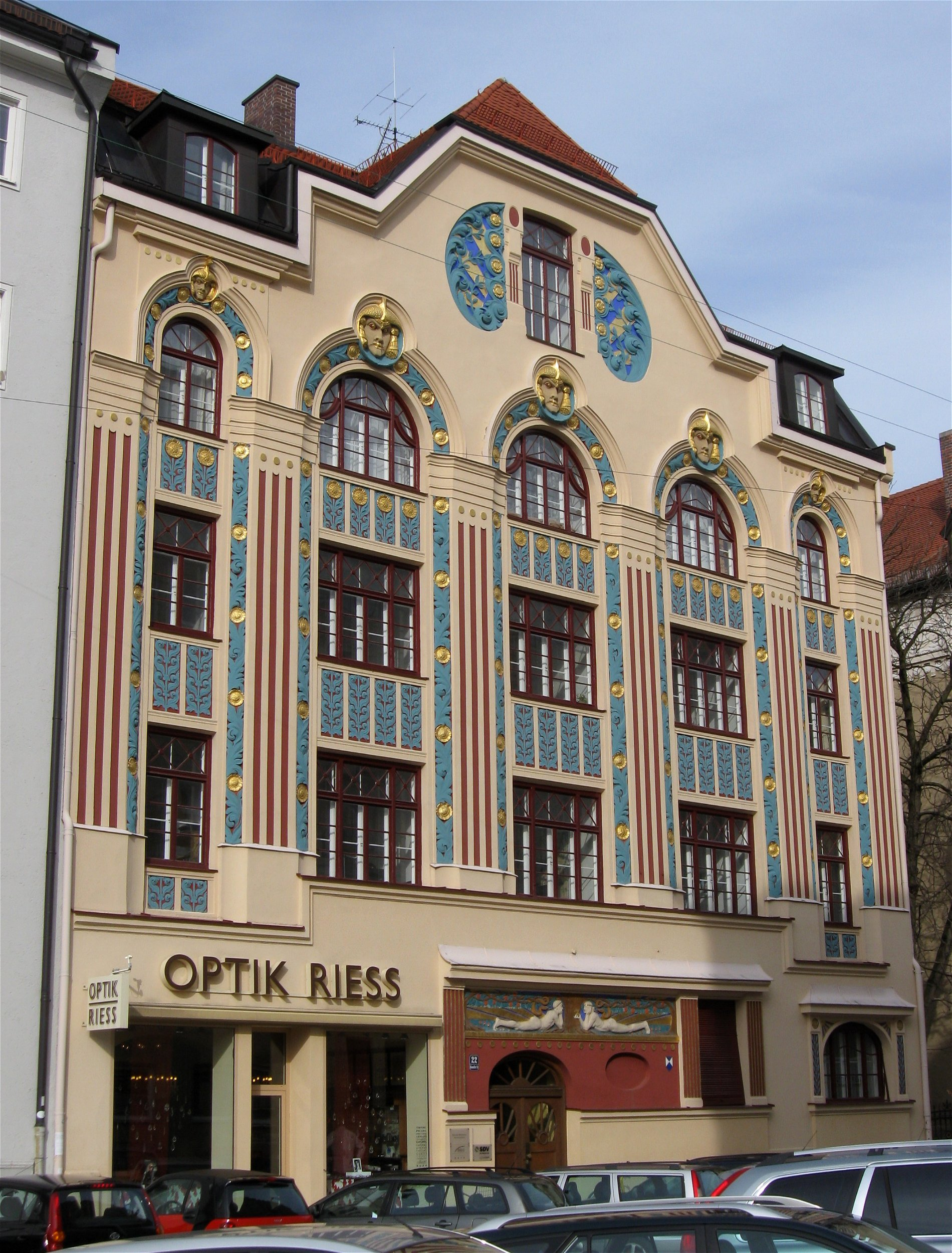 Ainmillerstraße 22; Mietshaus, viergeschossiger Jugendstilbau mit Zwerchhaus, reich geliederter polychromer Fassade und figürlichem Dekor, von Felix Schmidt nach Fassadenentwurf von Henry Helbig und Ernst Haiger, 1898; mit Einfahrtstor, bauzeitlich